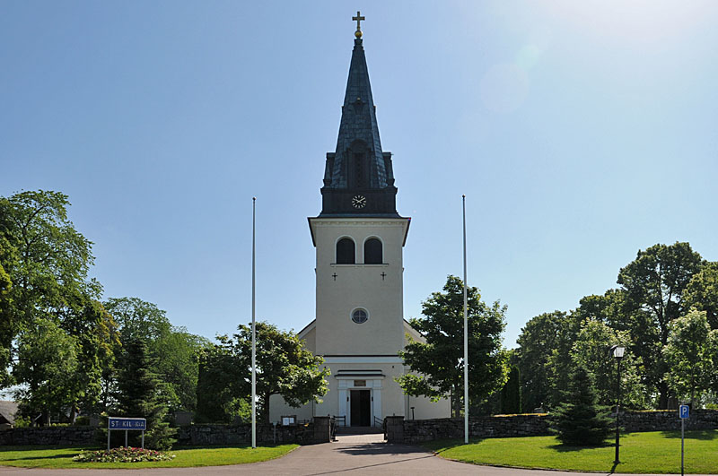 Stora Kils kyrka i Stora Kils församling i Karlstads stift